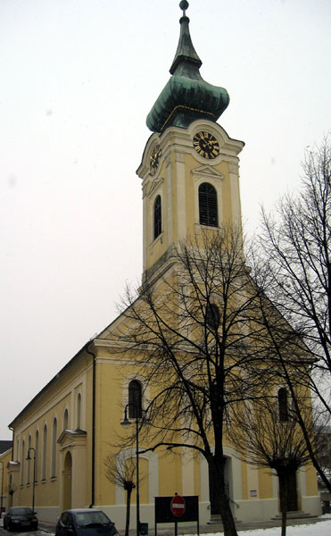 The Evangelical Church in Pinkafeld, Burgenland, Austria